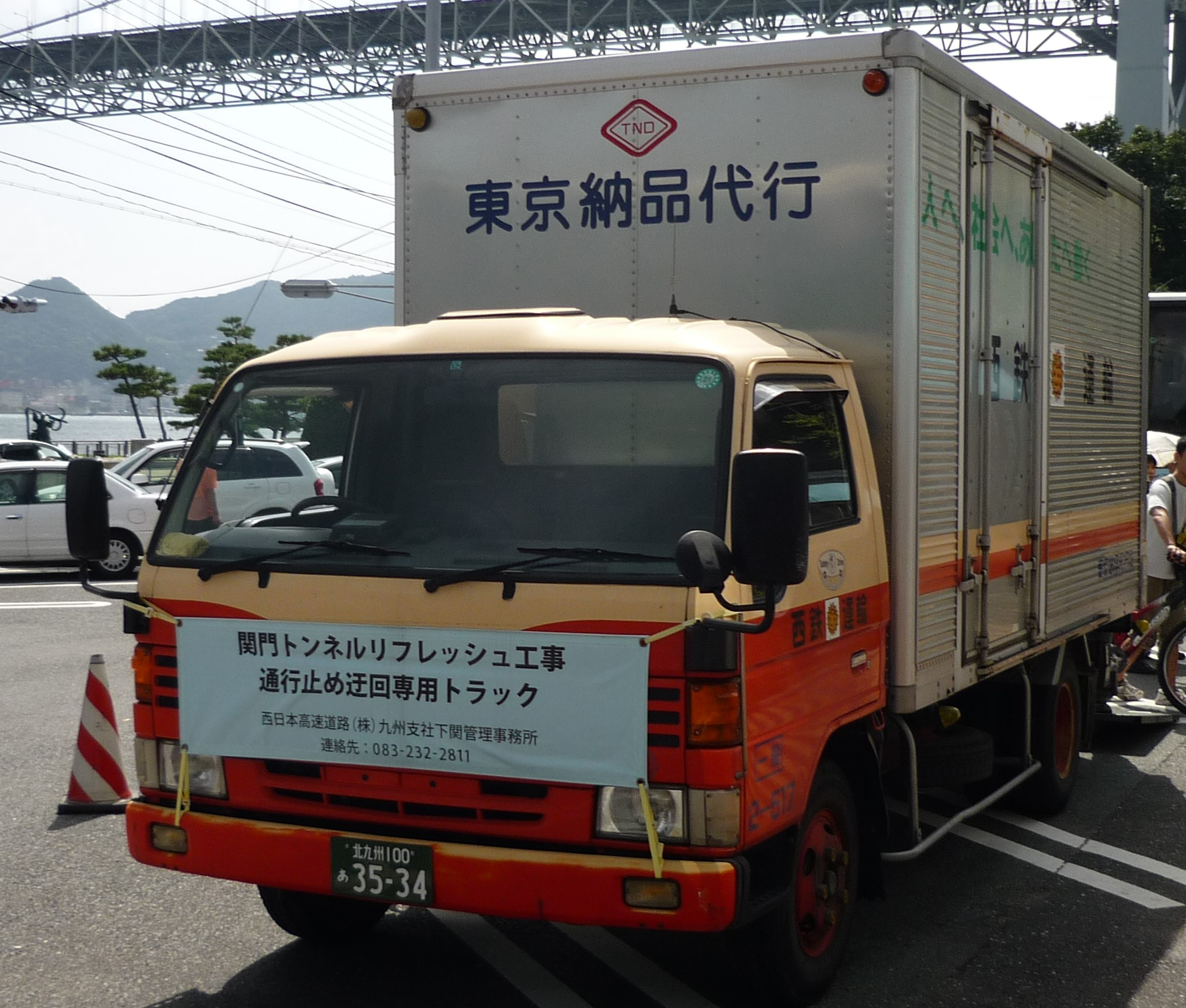 関門トンネル人道リフレッシュ工事対応の二輪車向けトラック（2009年10月） Panasonic Lumix DMC-FS3